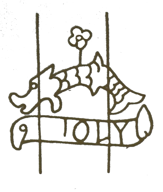 filigrane d'un moulin de l'Aube.